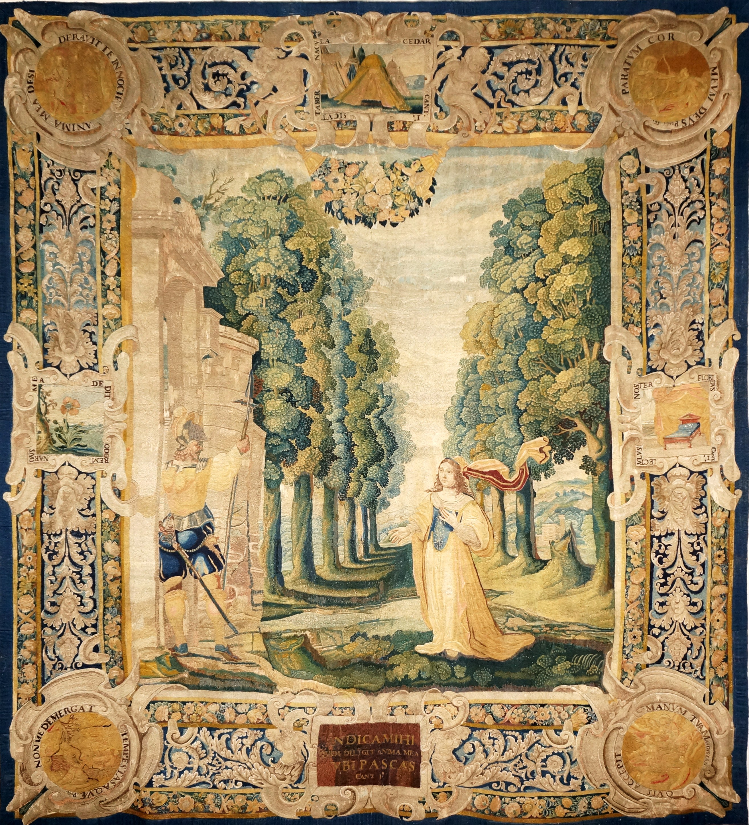 Fabrication française de la fin du XVIIe siècle, provient du château d'Hauteville dans l'Aisne. Sur le thème du Cantique des cantiques.